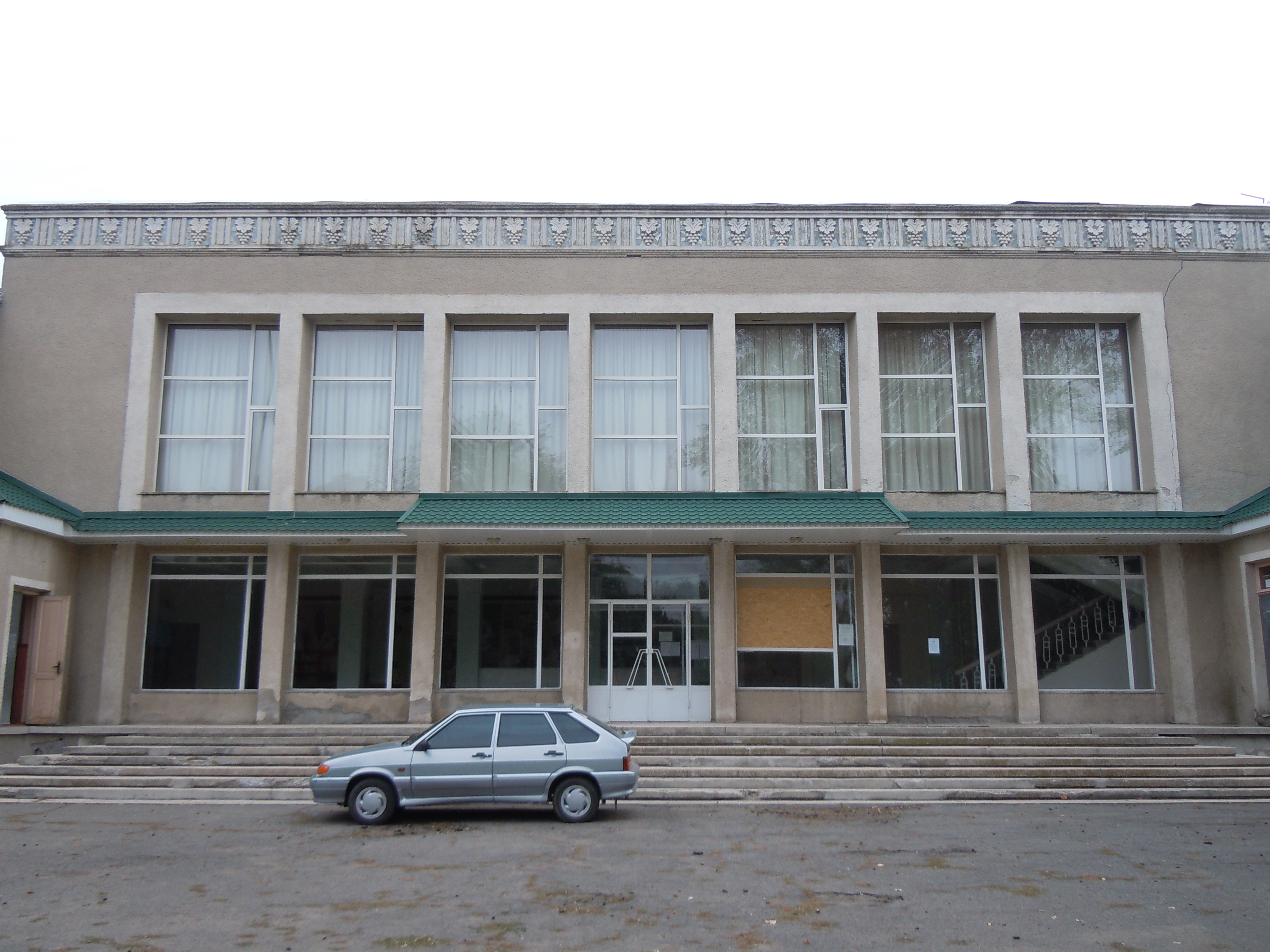 Будинок клубу із Музеєм Болгарської культури в селі Зоря, Саратський район, Одеська область